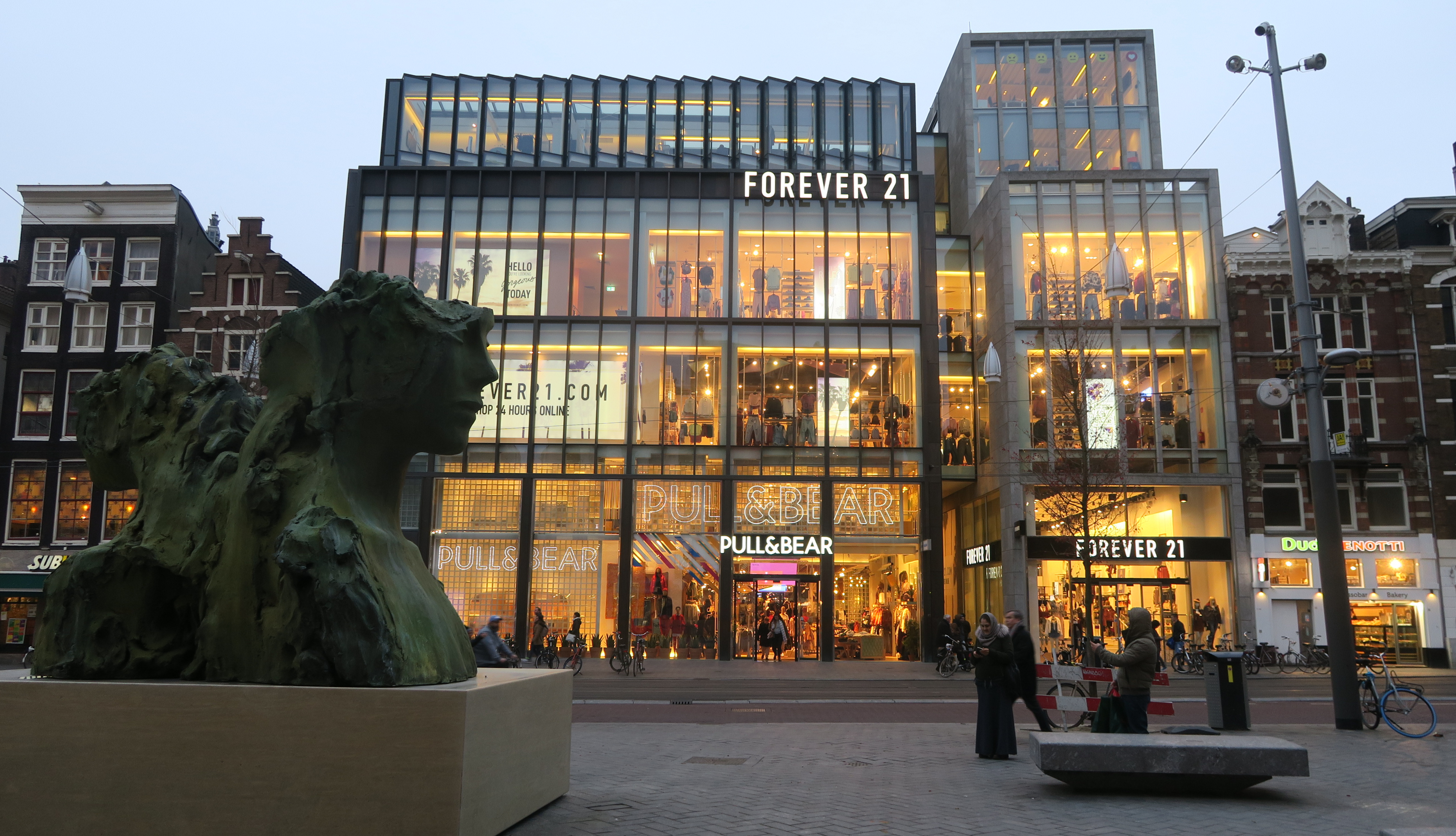 Rokin Plaza, met niet-werkende fontein